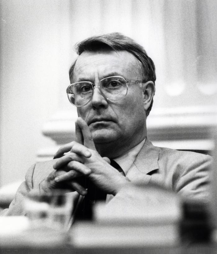 Staatssecretaris Henk Koning (VVD) tijdens een debat in de Tweede Kamer over de Antillen. Nederland, Den Haag, 6 juni 1985.